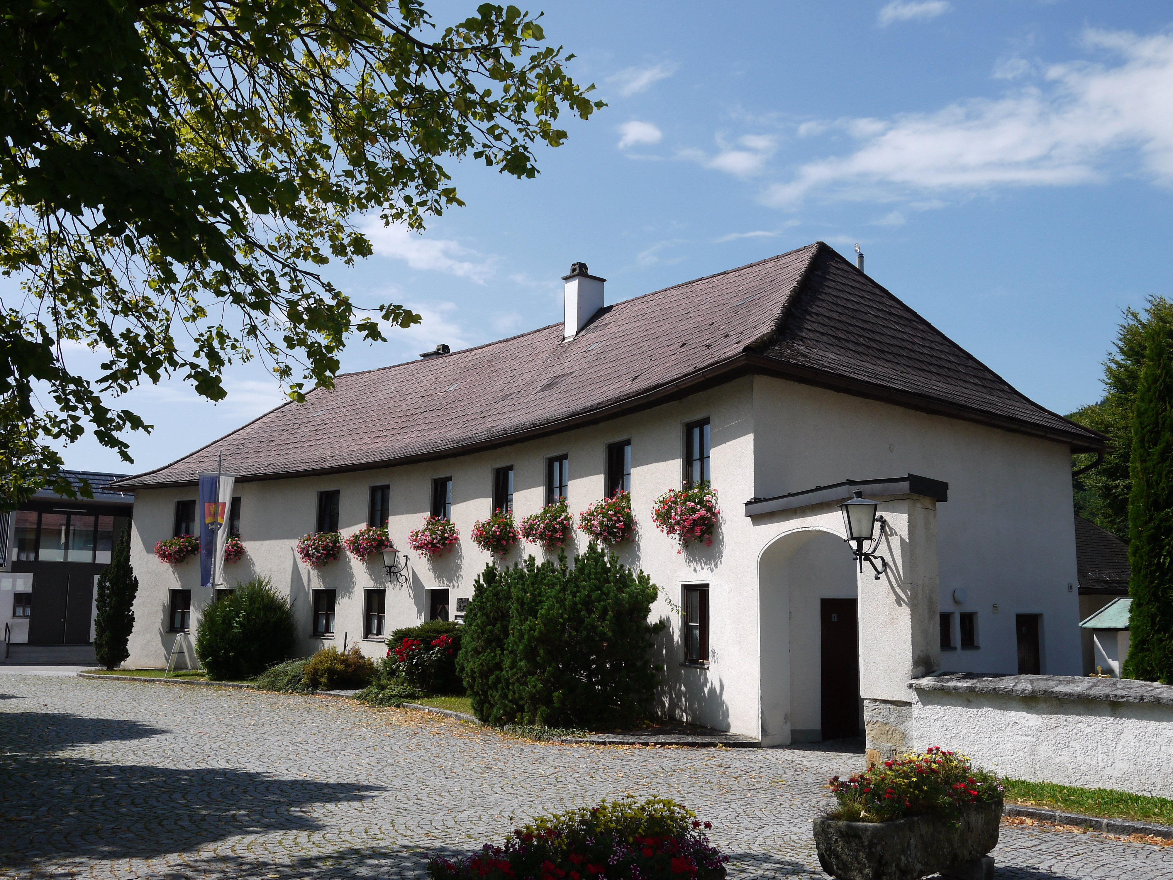 Heimathaus